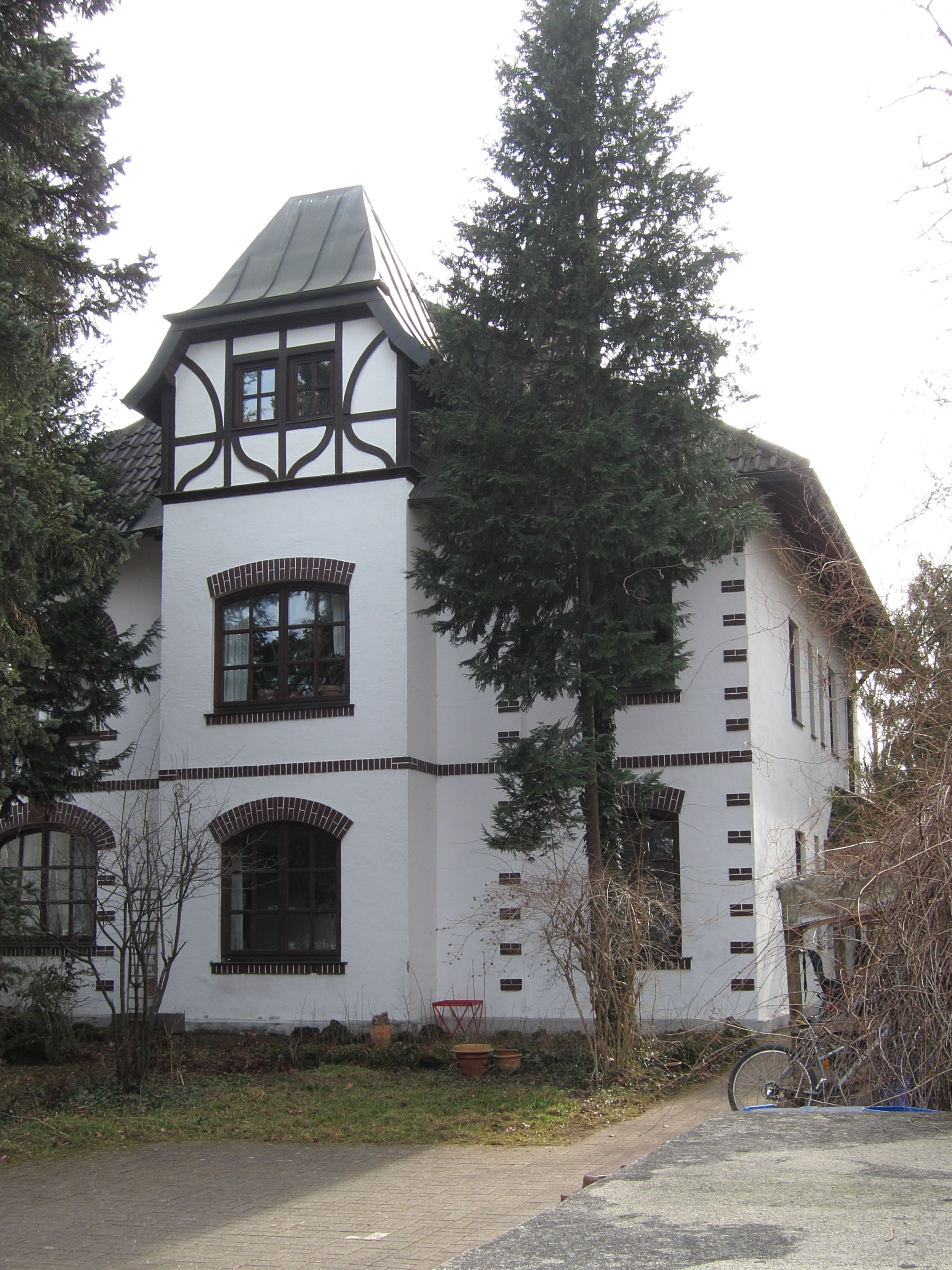 Marschnerstraße 27 a; Villa, Neurenaissance, mit Turm, um 1897/1900, aus dem Büro August Exter.